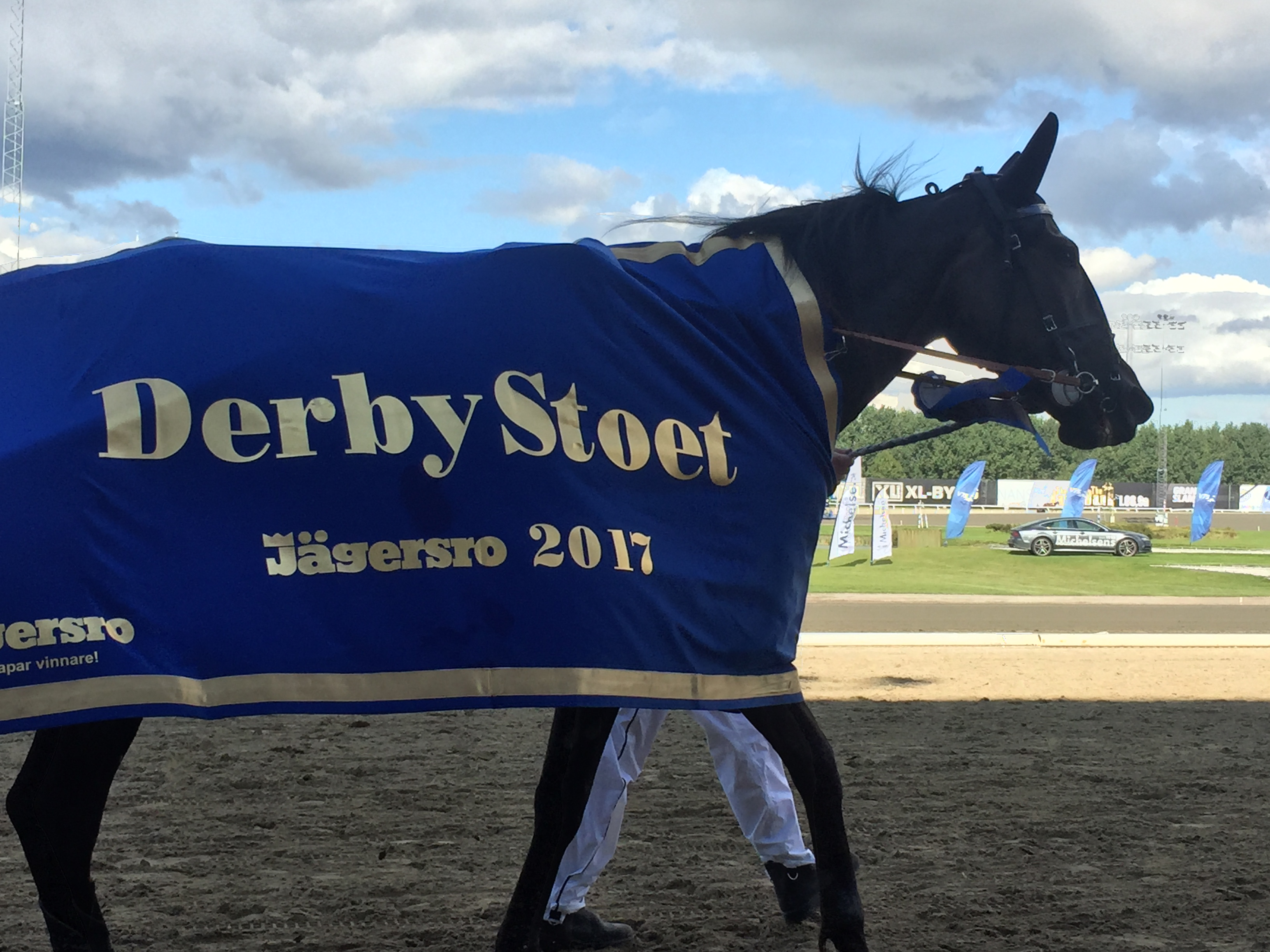 Cash Crowe efter segern i Derbystoet på Jägersro den 3 september 2017.